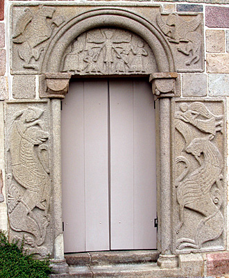 da. Stjær Kirke, Galten Kommune, Framlev Herred, Århus Amt, Denmark